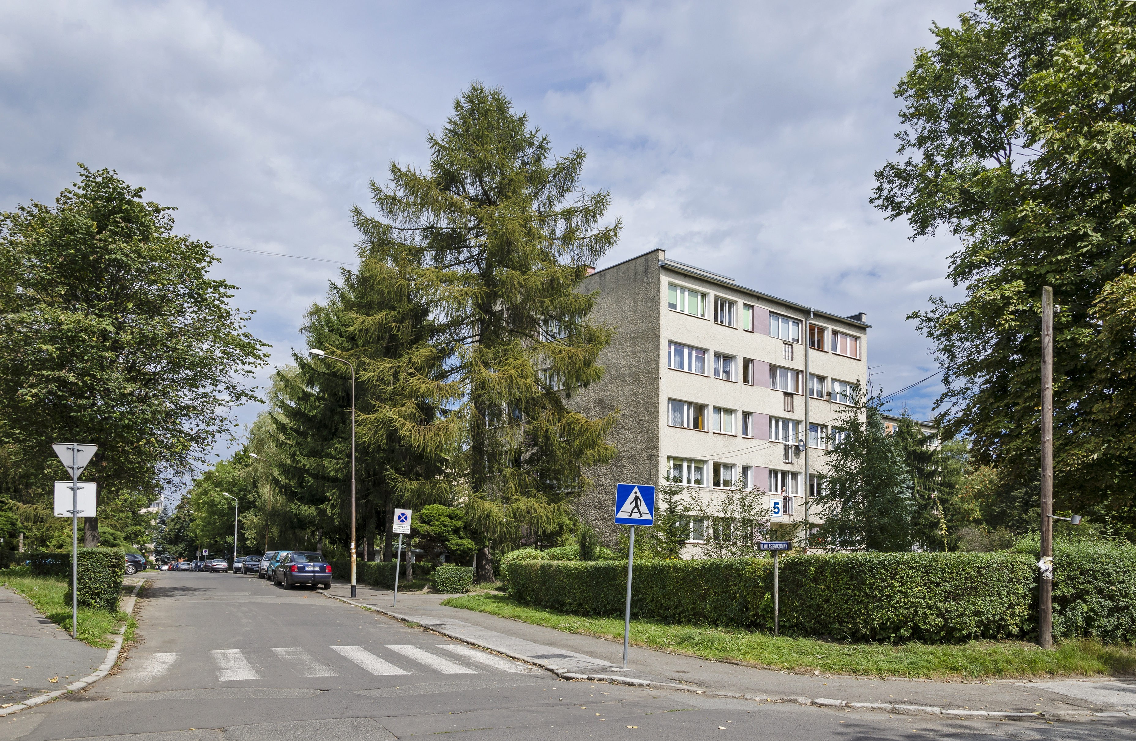 Walasiewiczówny Street in Kłodzko